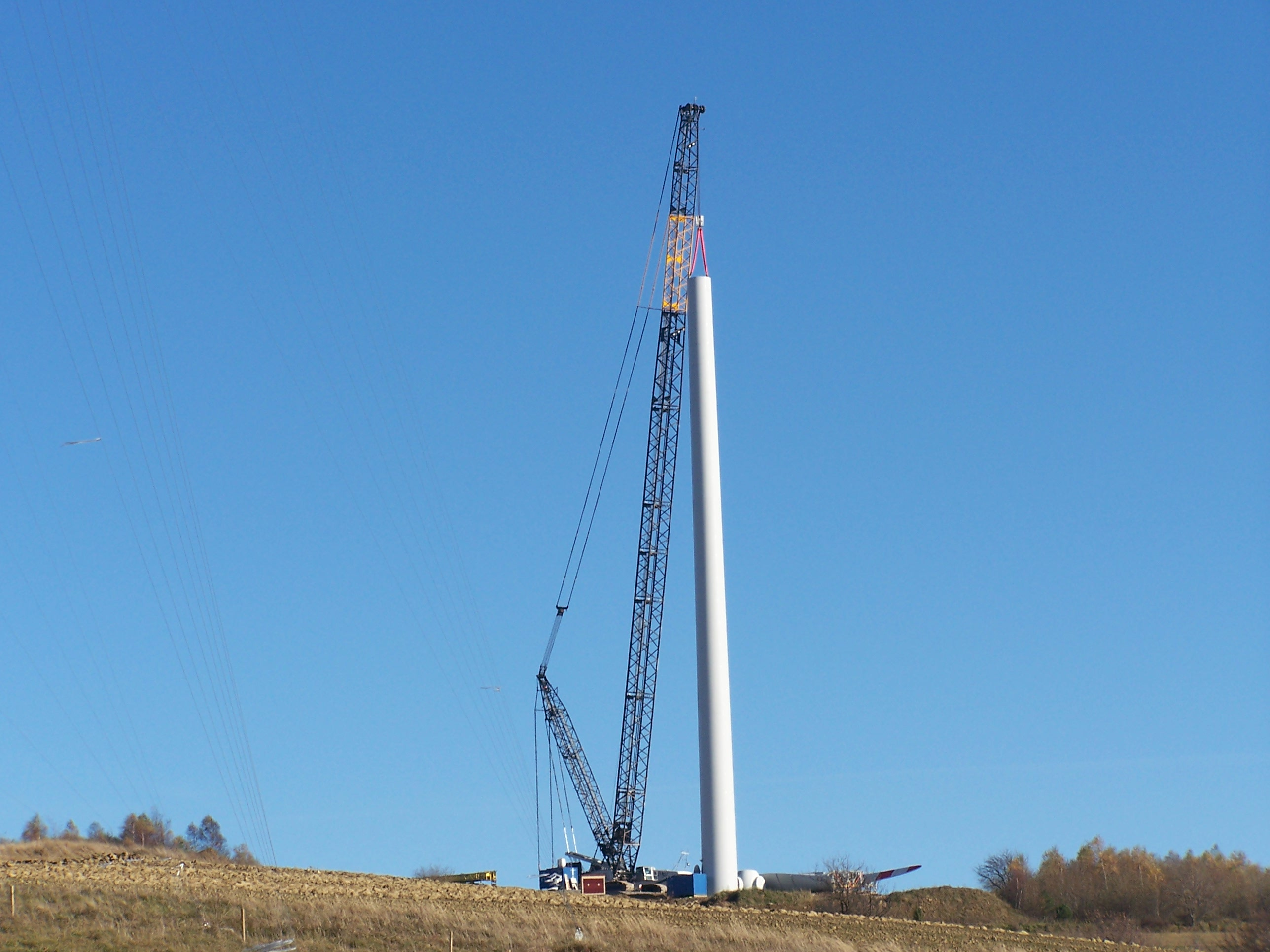 Budowa elektrowni wiatrowej wchodzącej w skład farmy Bukowsko